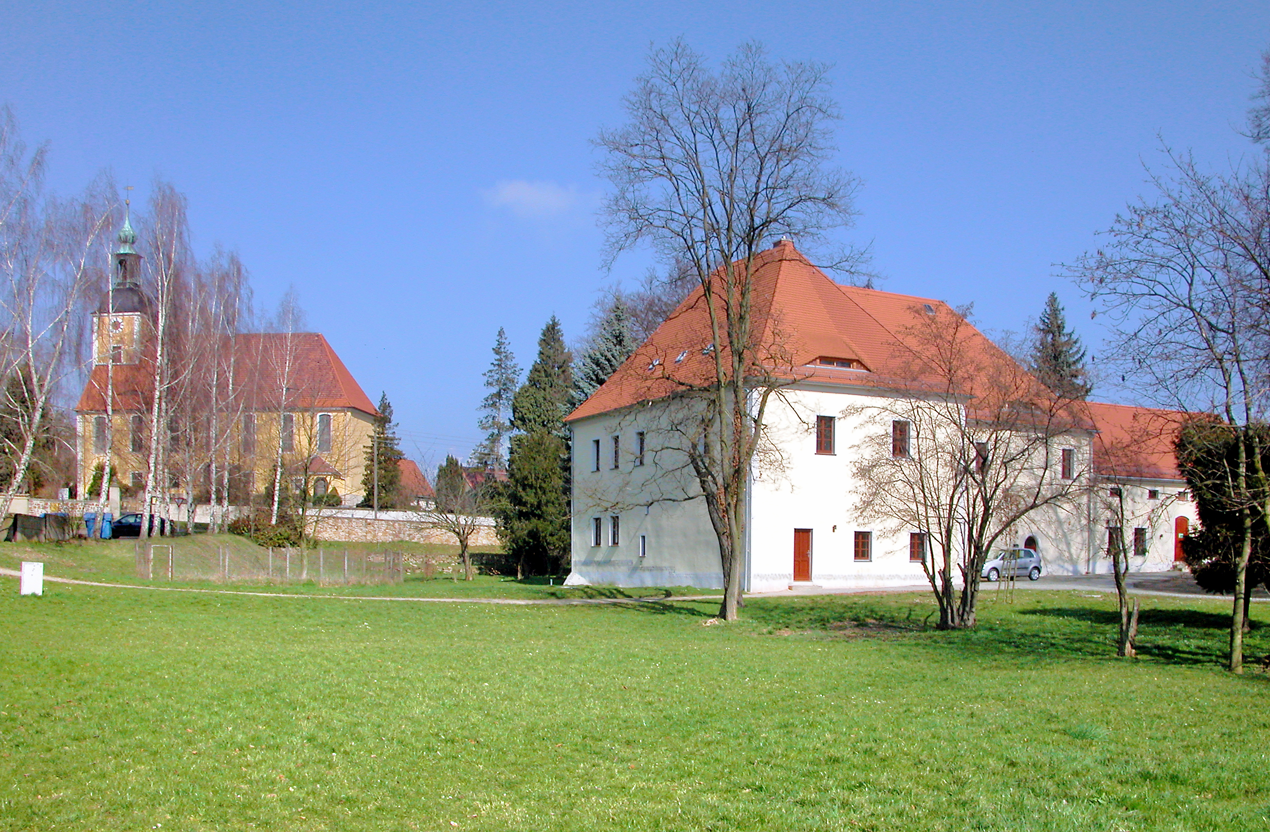 31.03.2009 04769 Sornzig (Sornzig-Ablaß): Barocke Dorfkirche (GMP: 51.213284,13.015535) und ehemaliges Zisterzienserinnenkloster St. Marienthal, Klosterstraße 16 (GMP: 51.212854,13.016662), als Nonnenkloster 1241 gegründet. Im Zuge der Reformation wandelte sich das Kloster in einen Klostergut genannten Landwirtschaftsbetrieb, der zeitweilig dem letzten Bischofs von Meißen gehörte. Im Gefolge der Bodenreform wurde daraus 1946 ein Volkseigenes Gut, das 1952 mit dem Volksgut Mügeln vereinigt und 1991 aufgelöst wurde. 1996 reprivatisiert. Sicht von Süden. [DSCN35767.TIF]20090331015.JPG(c)Blobelt